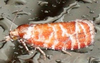 Praktfuruskuddvikler Rhyacionia pinicolana har en tydelig farge.